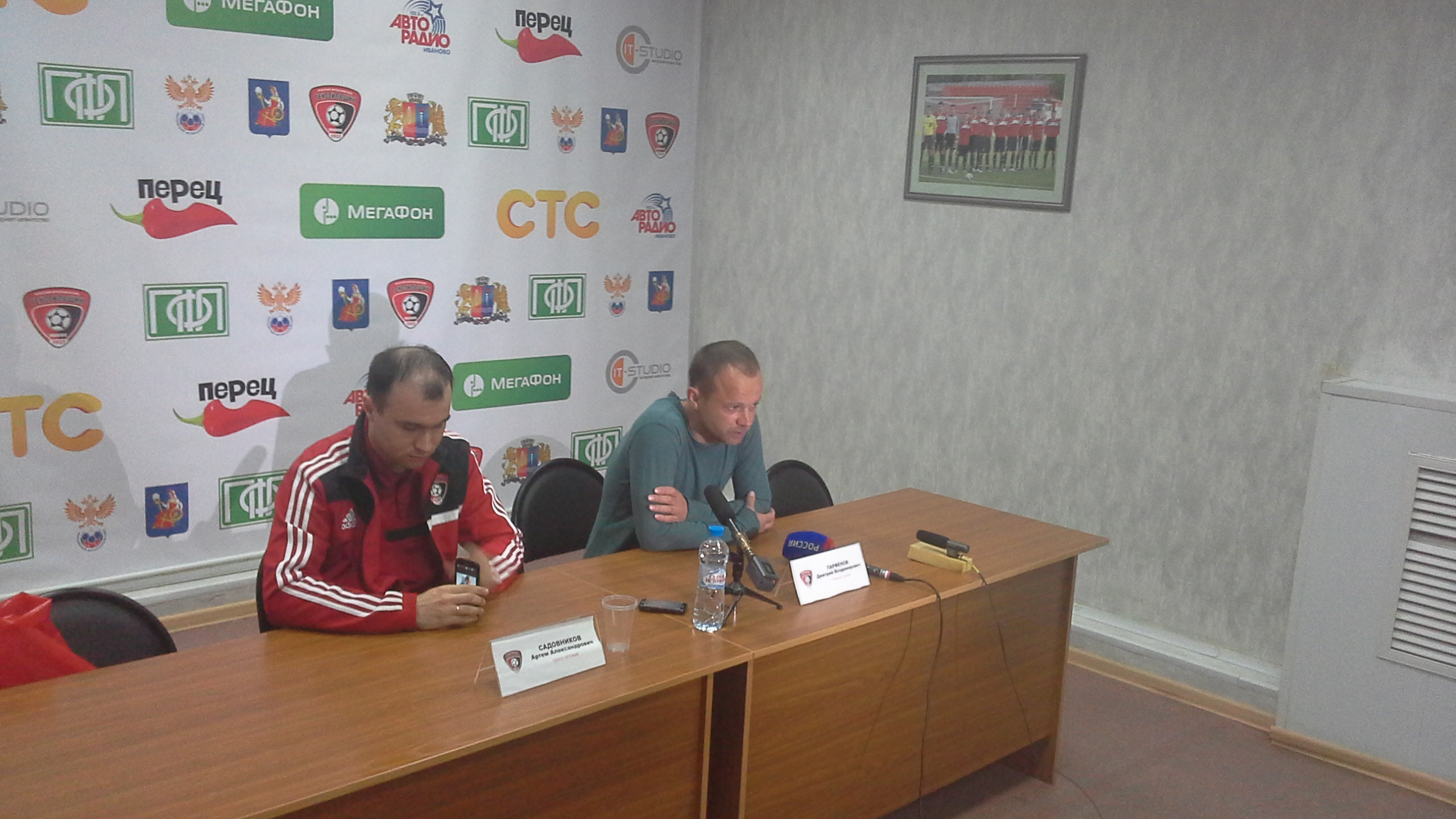 Дмитрий Парфенов на пресс-конференции в Иванове